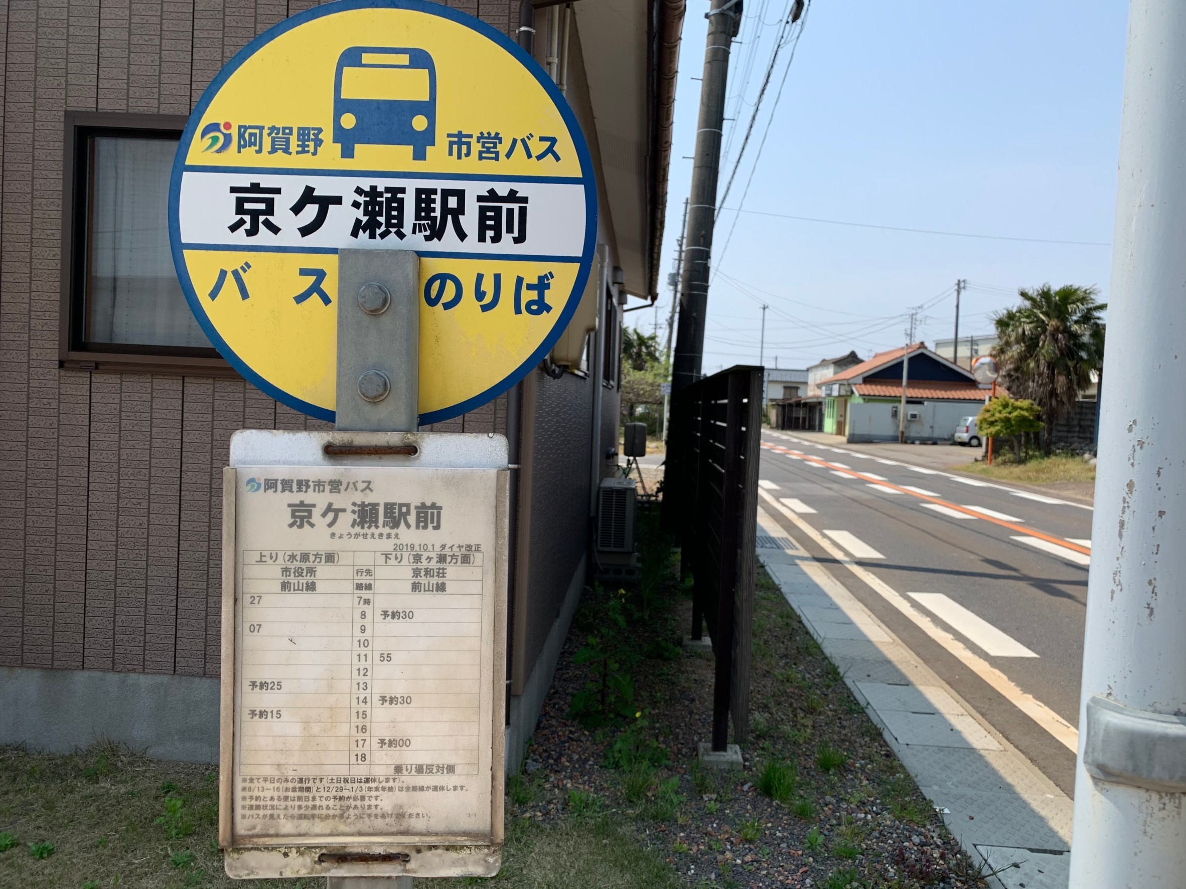 阿賀野市営バス 京ケ瀬駅前停留所（2020年5月）